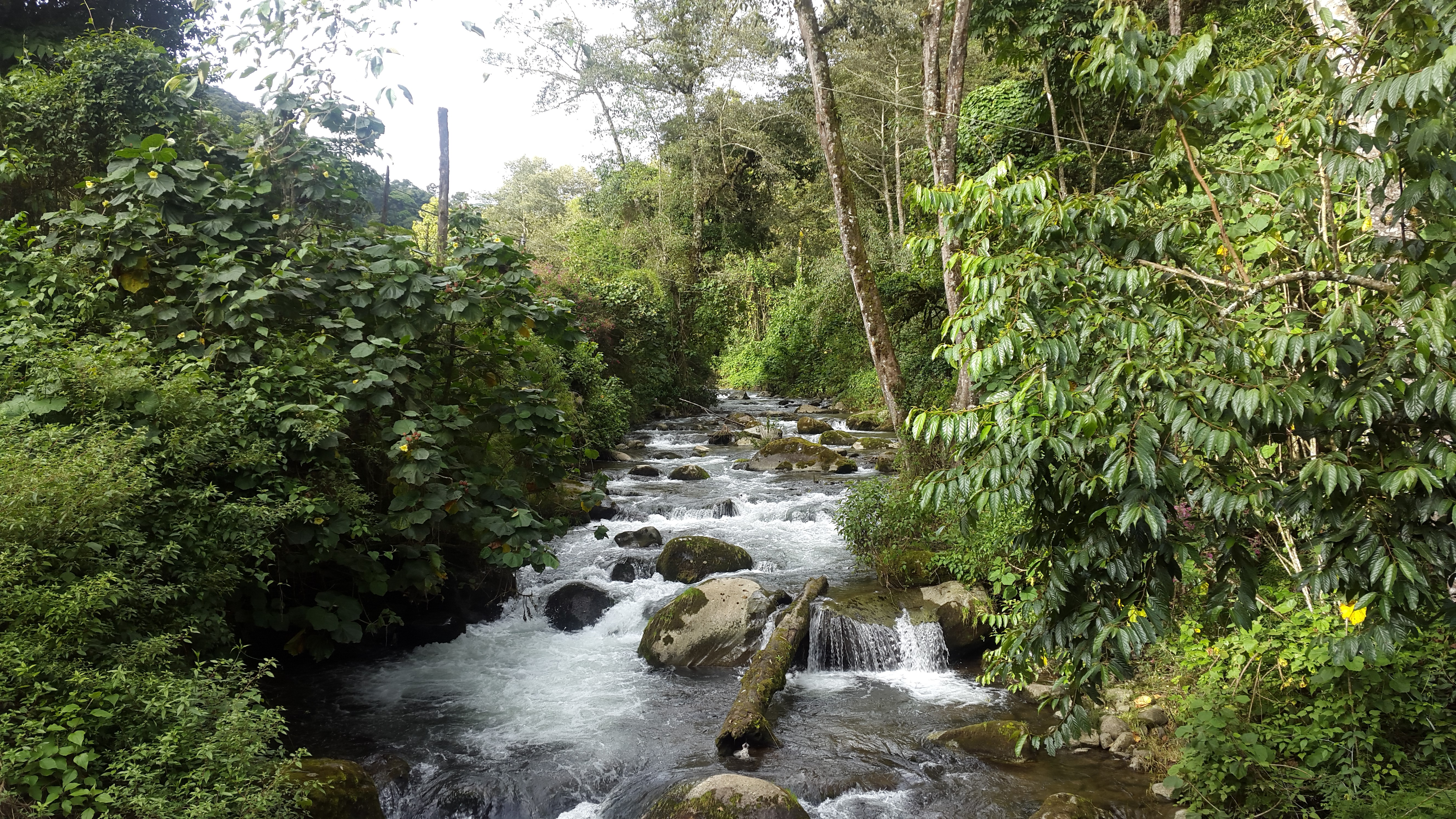 Río Savegre a la altura de San Gerardo de Dota. Costa Rica.